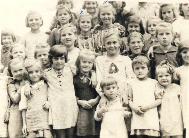 Ukradeni otroci v taborišču Saldenburg: Deklice v taborišču.